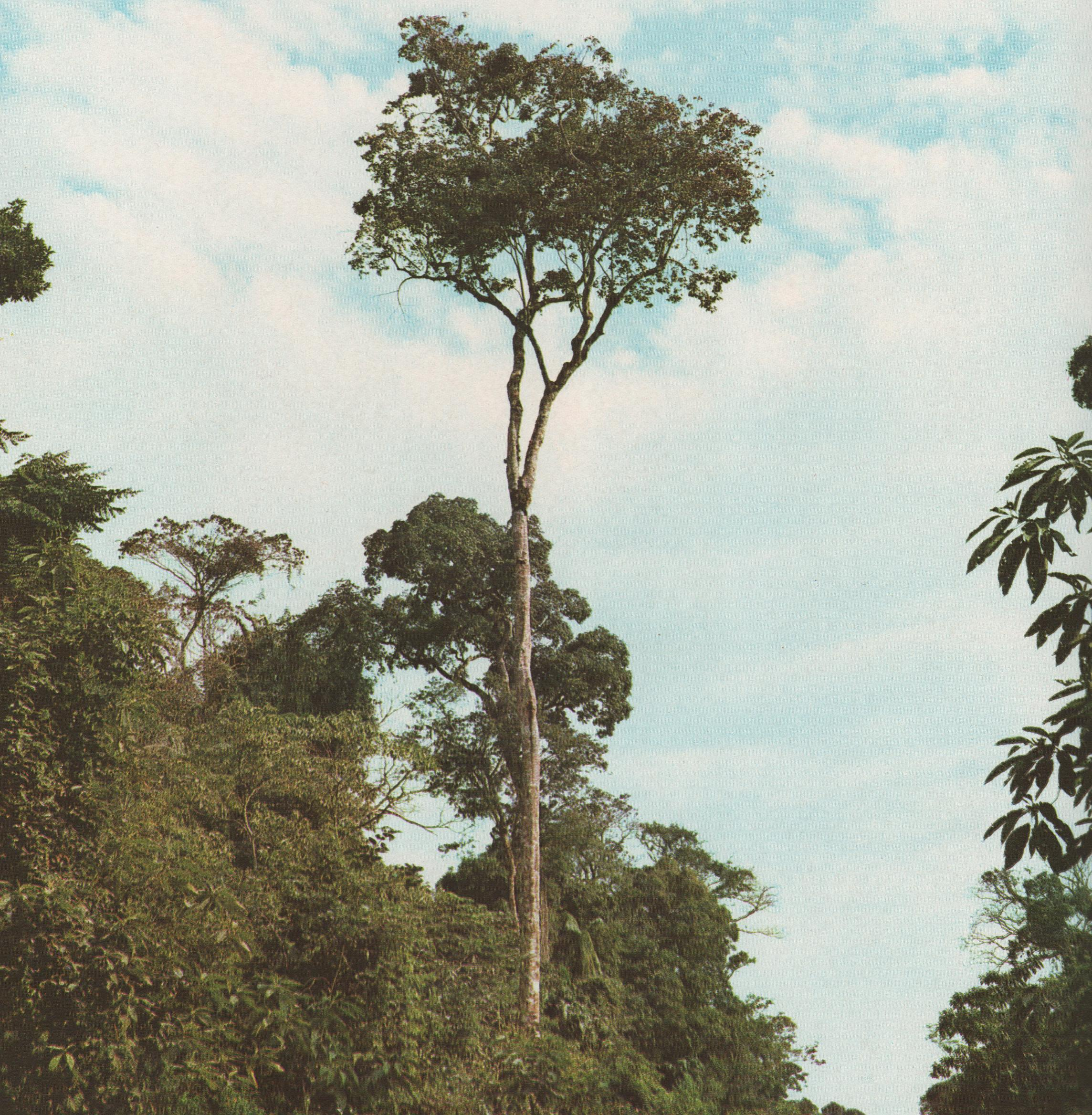 Ejemplar de Guatambú Blanco (Balfourodendron riedelianum) en la provincia de Misiones, Argentina.